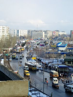 г.Волжский, Волгоградская обл., новая часть города